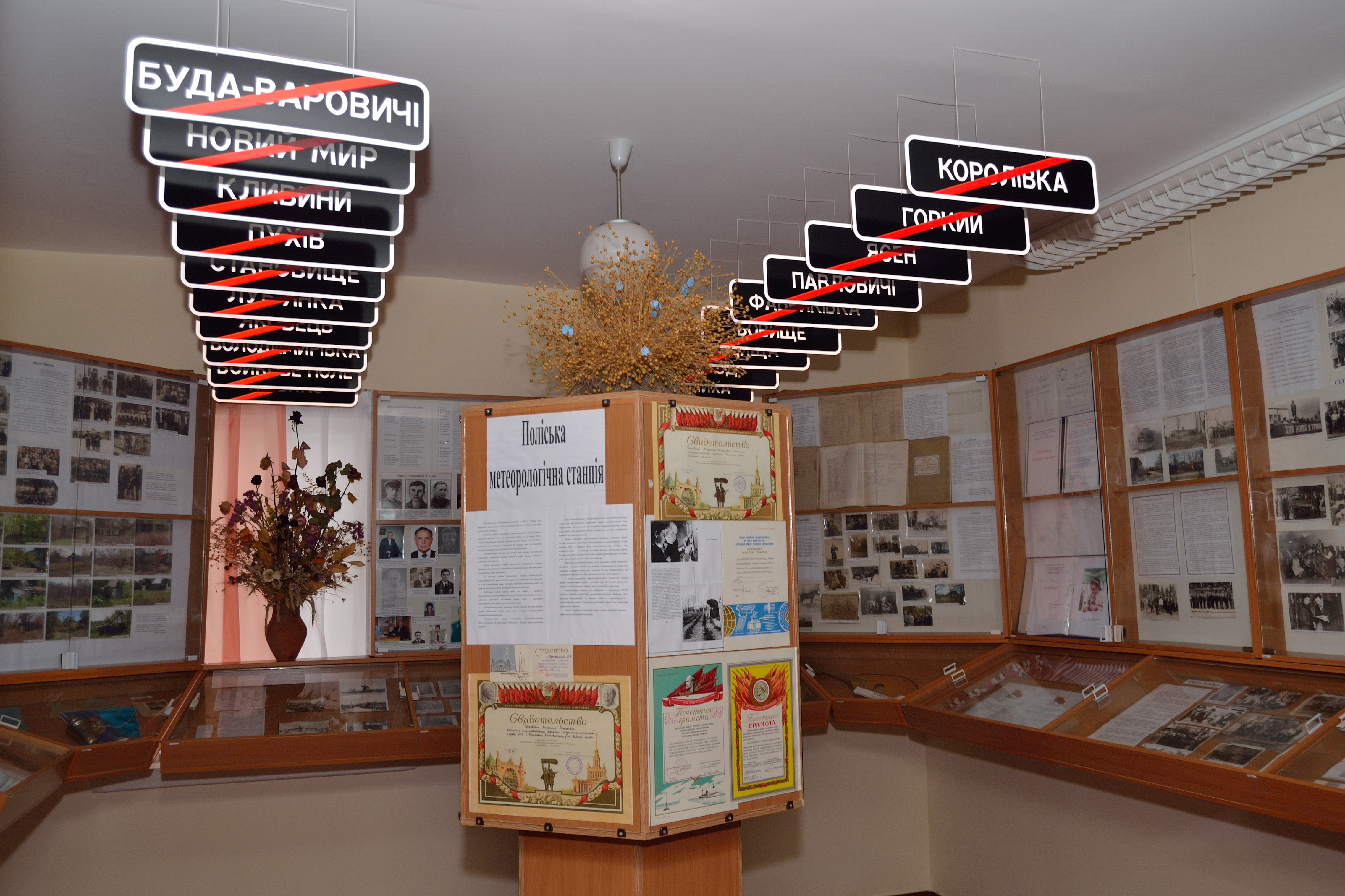 Рис. 4. Фрагмент експозиції., Музей пам'яті Поліського району